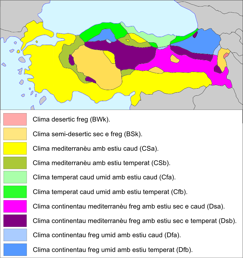 Esquèma climatic de Turquia (segon la classificacion de Koppen).